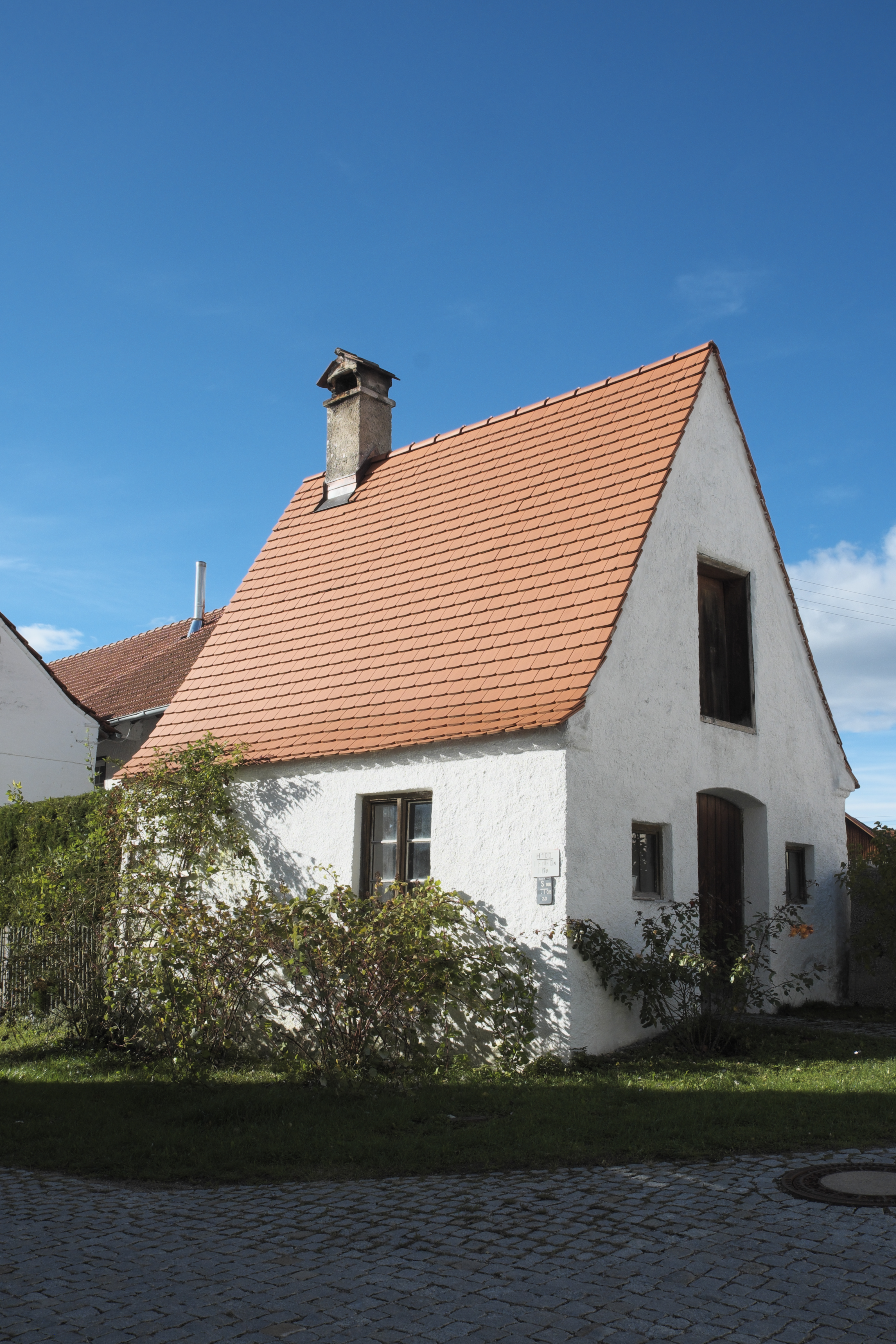 Wasch- und Backhaus bei der katholischen Pfarrkirche St. Bartholomäus in Epfach (Denklingen) im Landkreis Landsberg am Lech (Bayern/Deutschland)